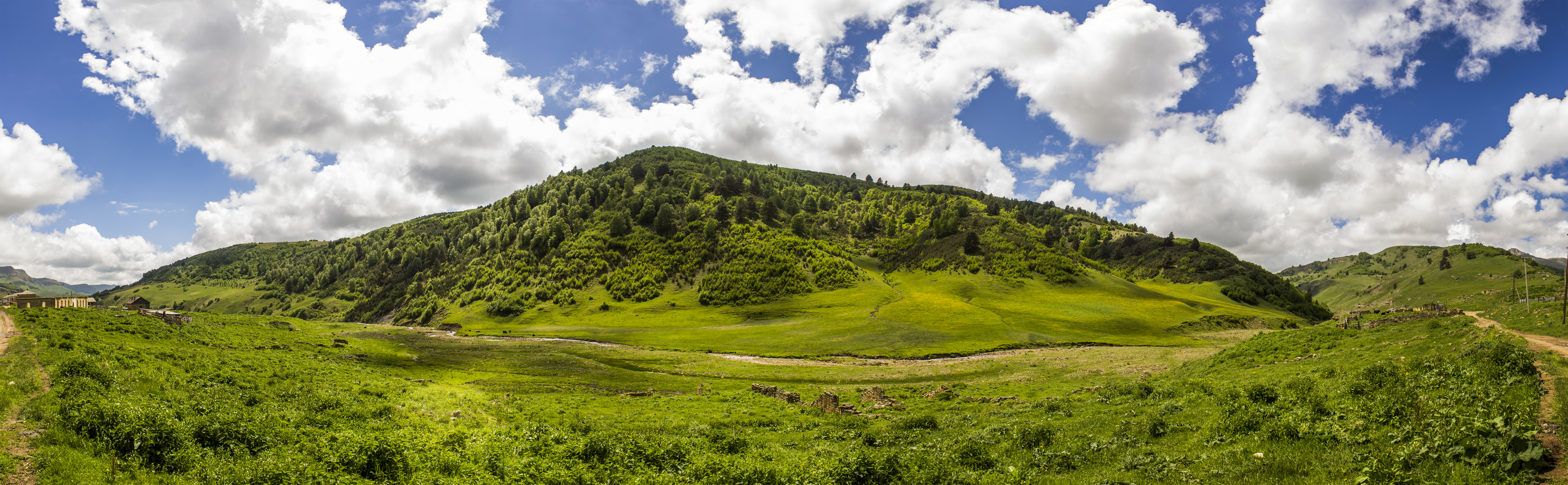 Хасаутский заказник: На территории Малокарачаевсого района. Расстояние от границы заказника до районного ценра с. Учкекен 20 км. С восточной стороны заказник граничит с Кабардино-Балкарской Республикой, а от южной границы до г. Эльбрус 14 км. Верховья рек Эшкакон и Подкумок,Черкесск,Малокарачаевский район, Карачаево-Черкессия This image is related to the protected area of Russia number 0910051